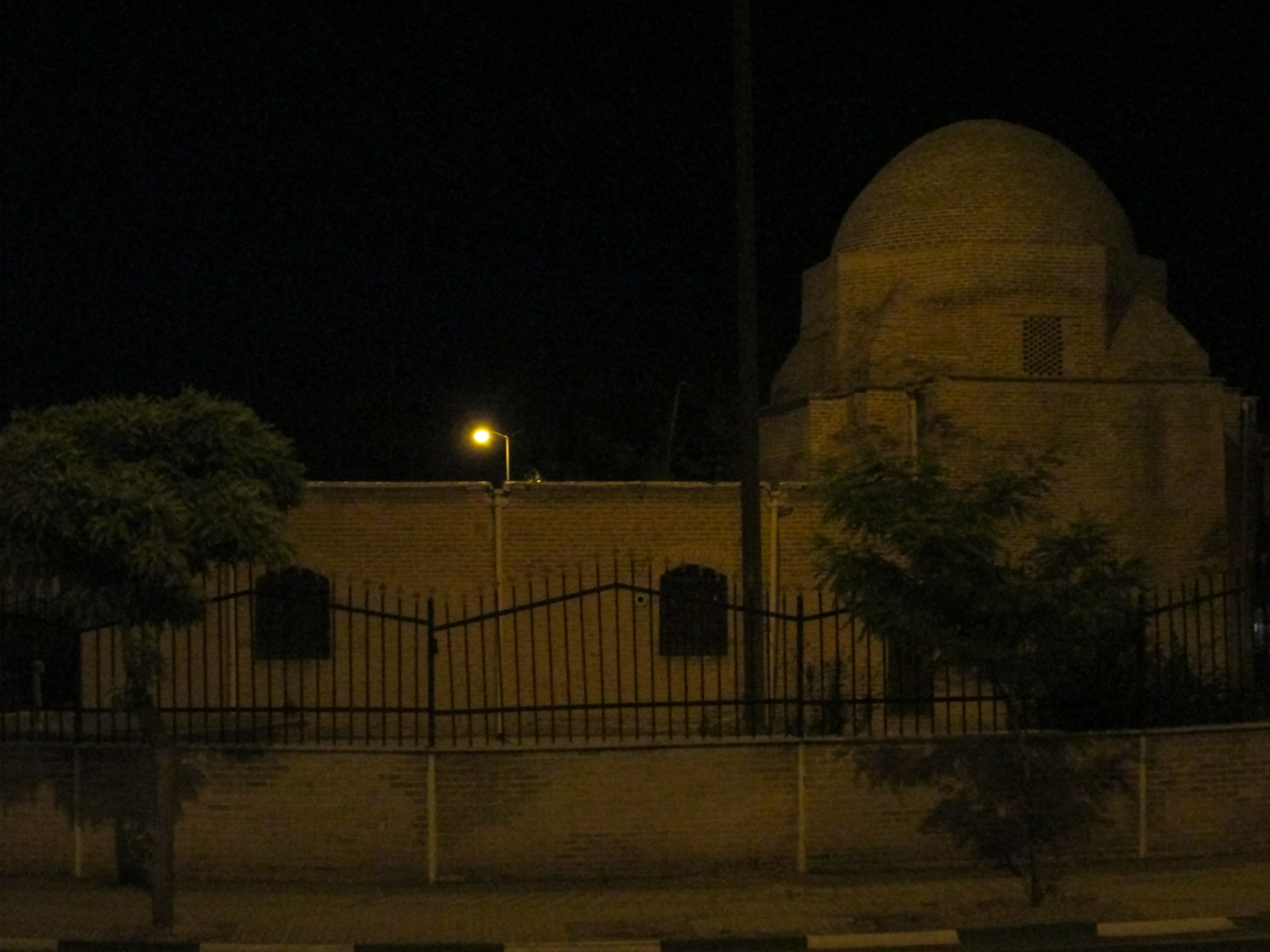 بقعۀ پیراحمد زهرنوش